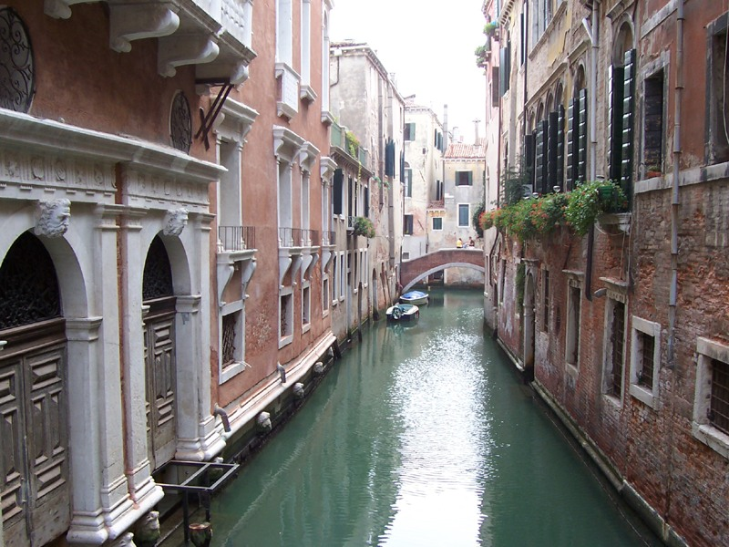 Venezia - Rio del Paradiso